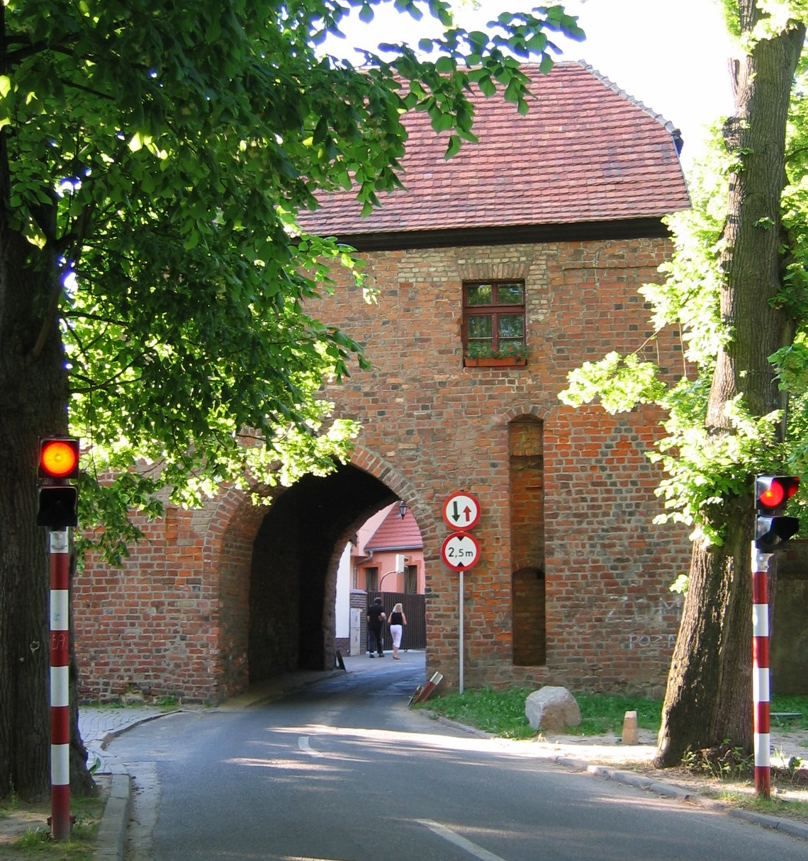 Łagów, ul. Kościuszki 1a - Brama Polska, XVI, XVII, XIX